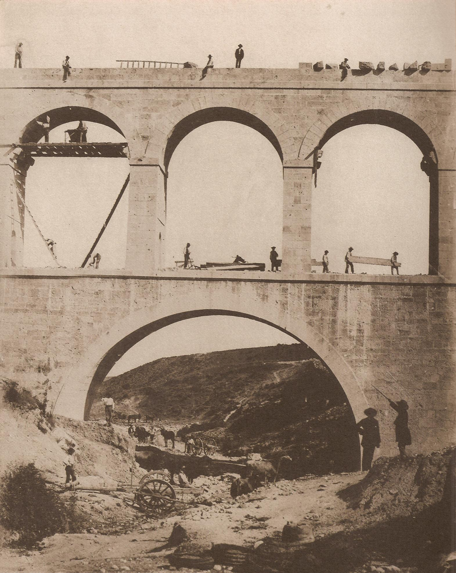 Charles Clifford, Obras del Canal de Isabel II (Madrid). Construcción del Puente-Acueducto de la Sima, 1855